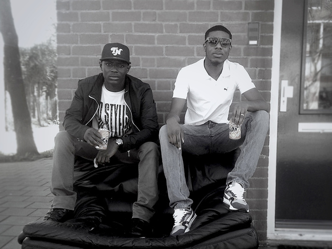 sbmg